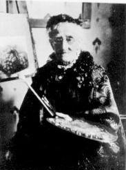 Eloise Harriet Stannard in ihrem Atelier, 1904